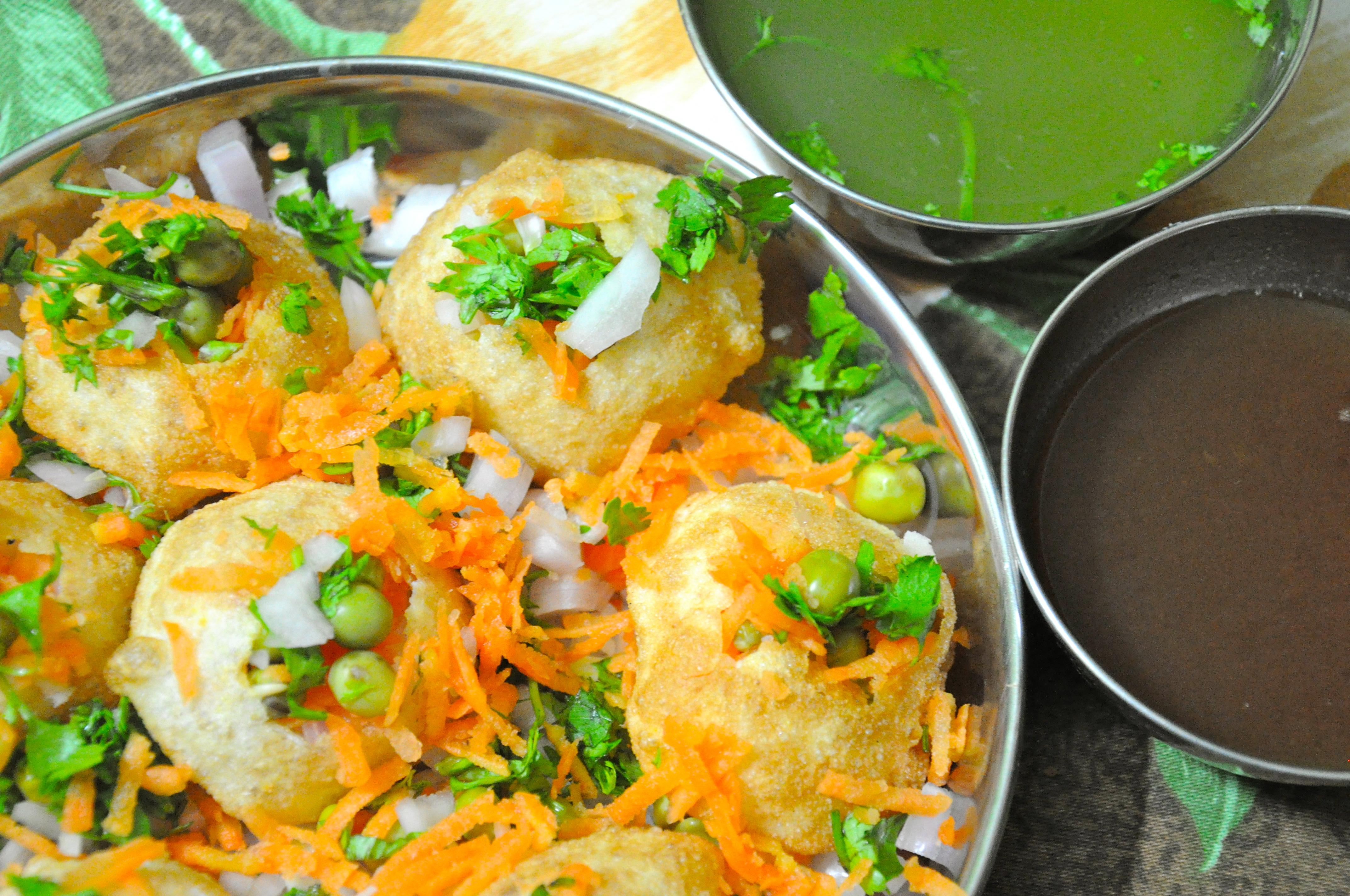 Home made Panipuri, an Indian snacks.